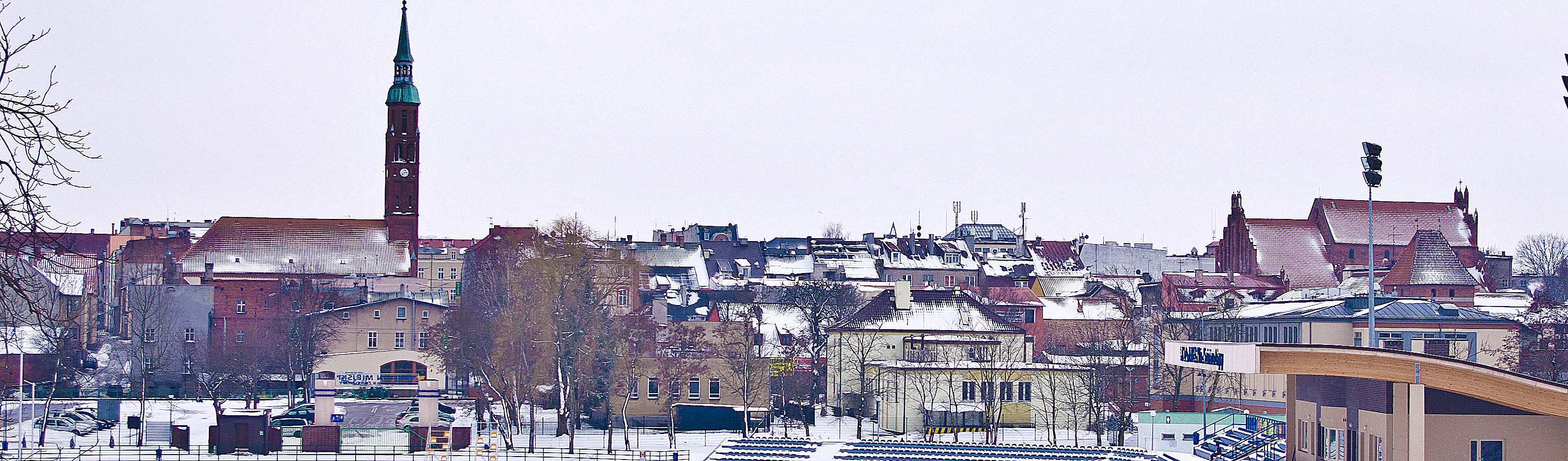 Starogard Gdański, zespół urbanistyczny Starego Miasta, XIII/XIV